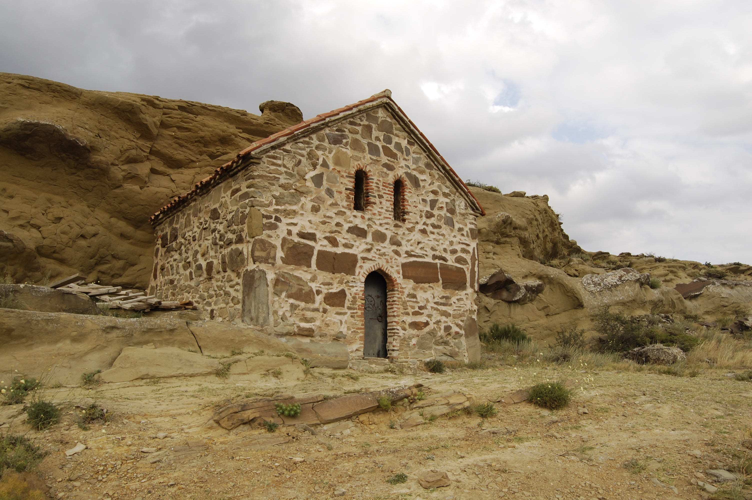 David Gareja Georgia - Sakartvelo